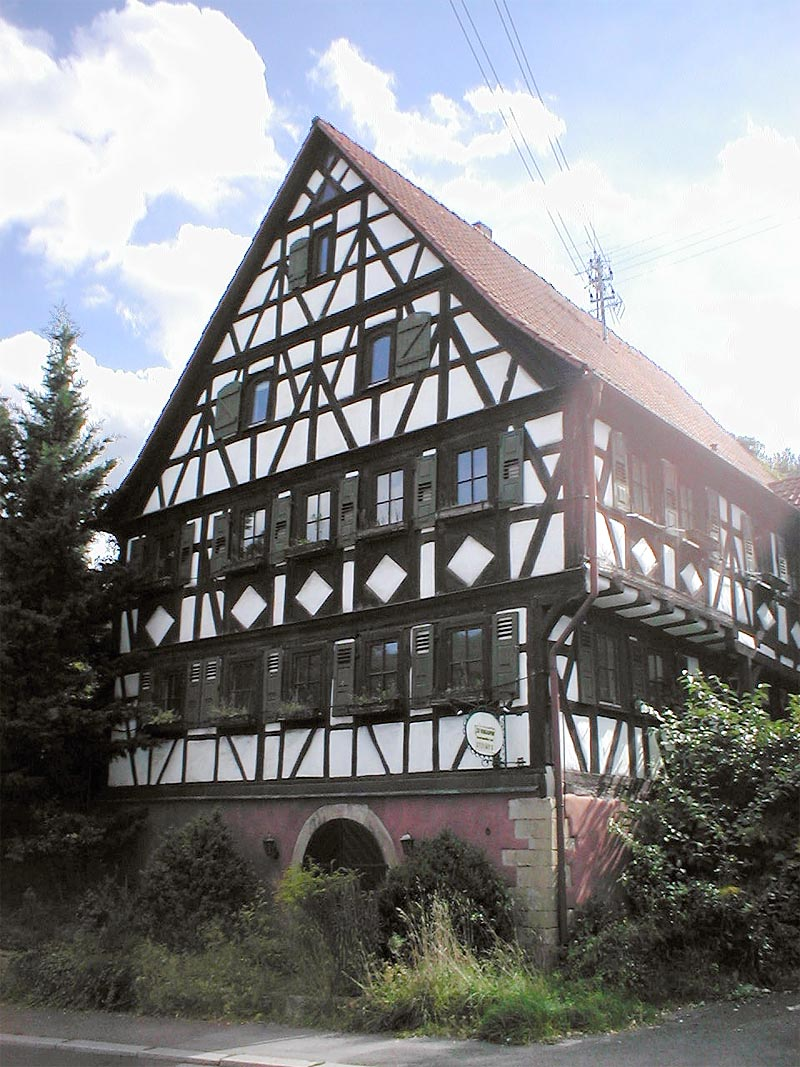 Fachwerkbau von 1733 in Heilbronn-Klingenberg